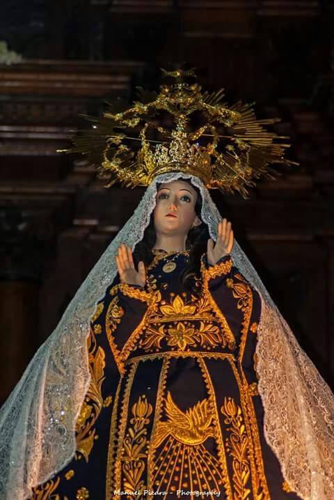 Imagen de la Santísima Virgen de la Asunción. Cutervo - Perú 1560 hasta la actualidad. Foto: Manuel Piedra